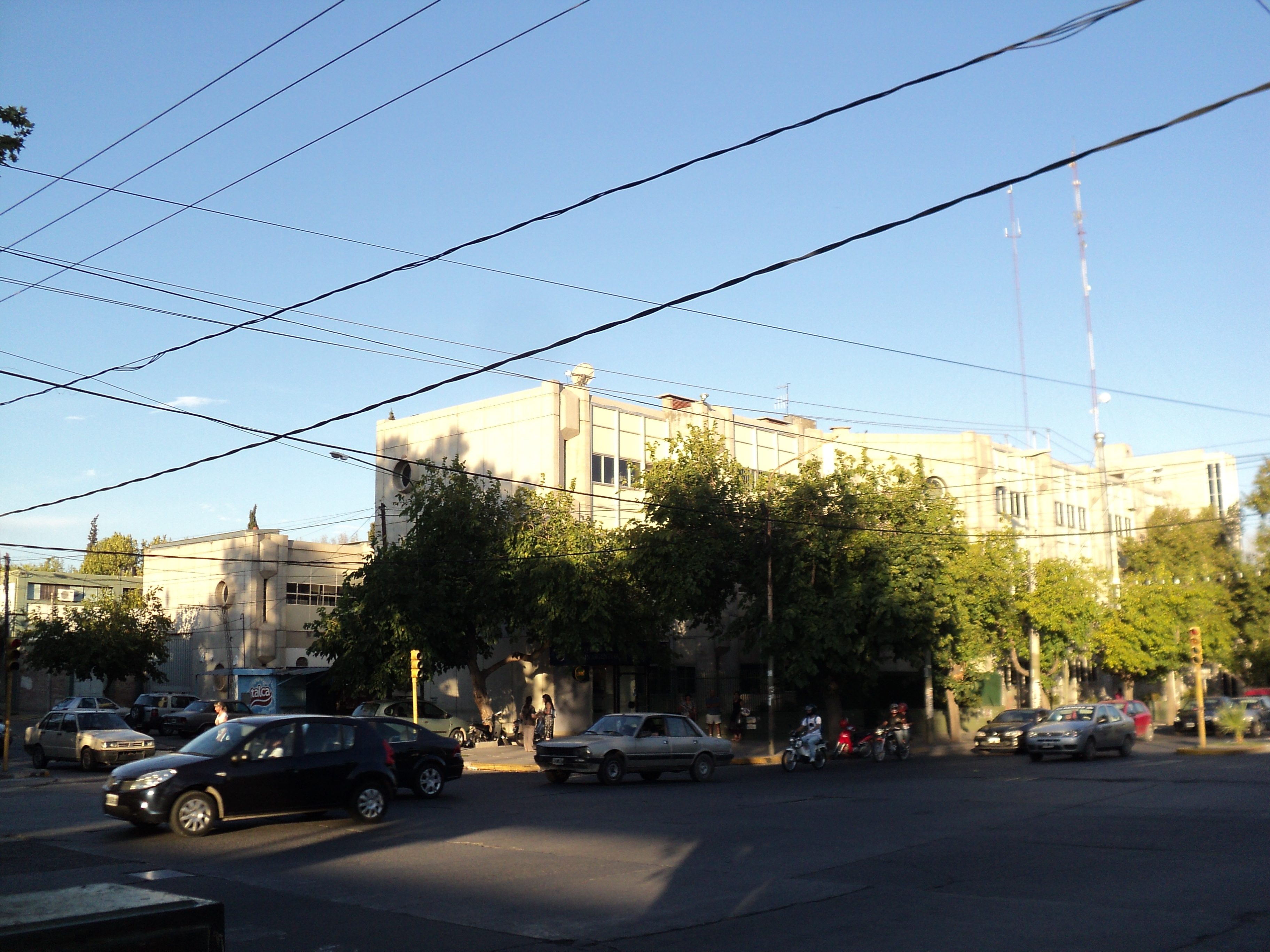 FECHADA DEL EDIFICIO PRINCIPLA DE FACULTAD DE INGENIERIA